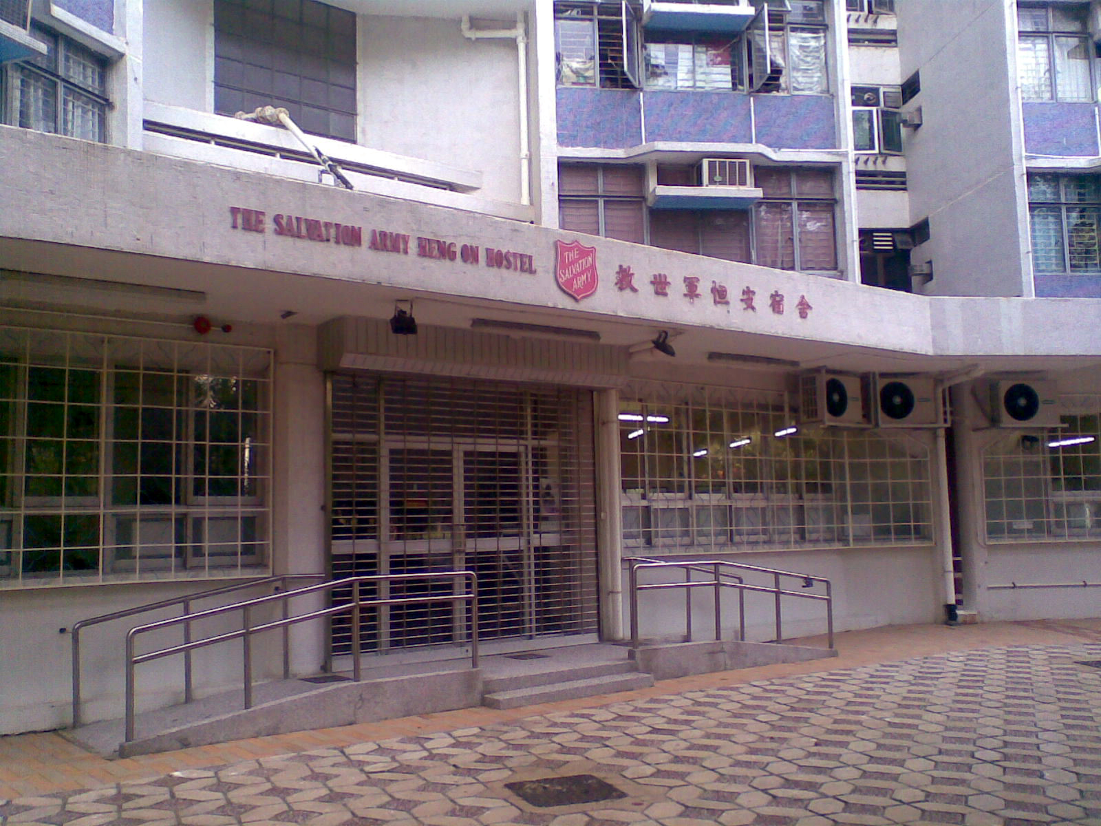 香港救世軍恒安宿舍